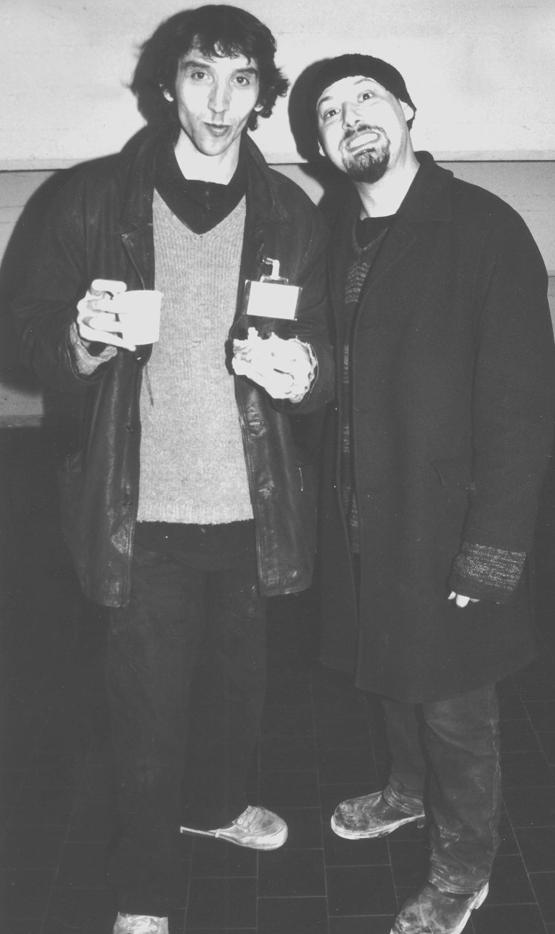 Il fumettista Gianni Pacinotti in arte Gipi, con l'amico e collega Francesco Ciampi in arte Ausonia, in Lucca Comics.